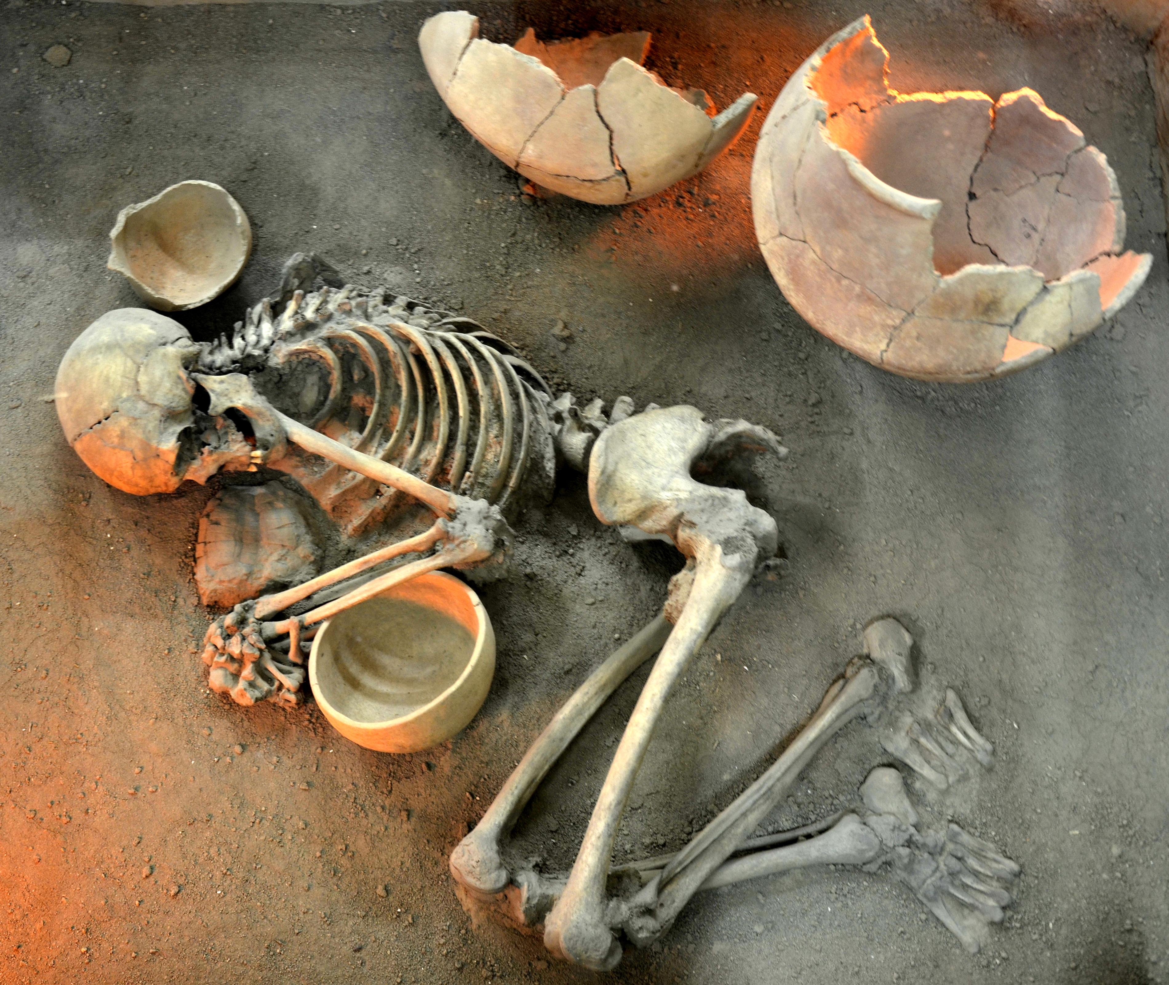 Iran - Hamadan - Hegmataneh - (Ecbatana)